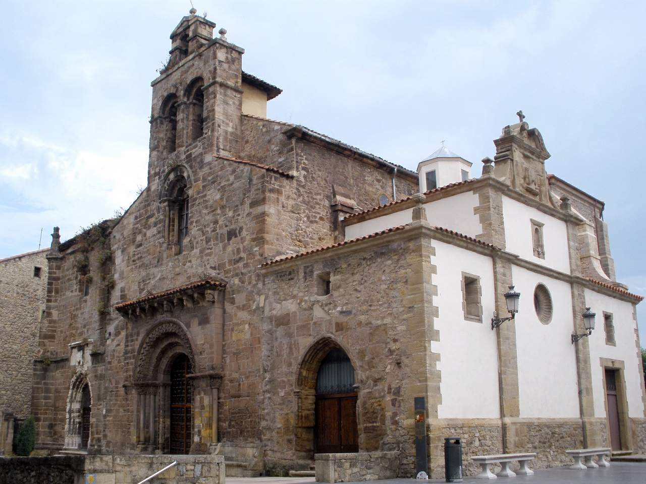 Iglesia de los Franciscanos (Avilés, Asturias)